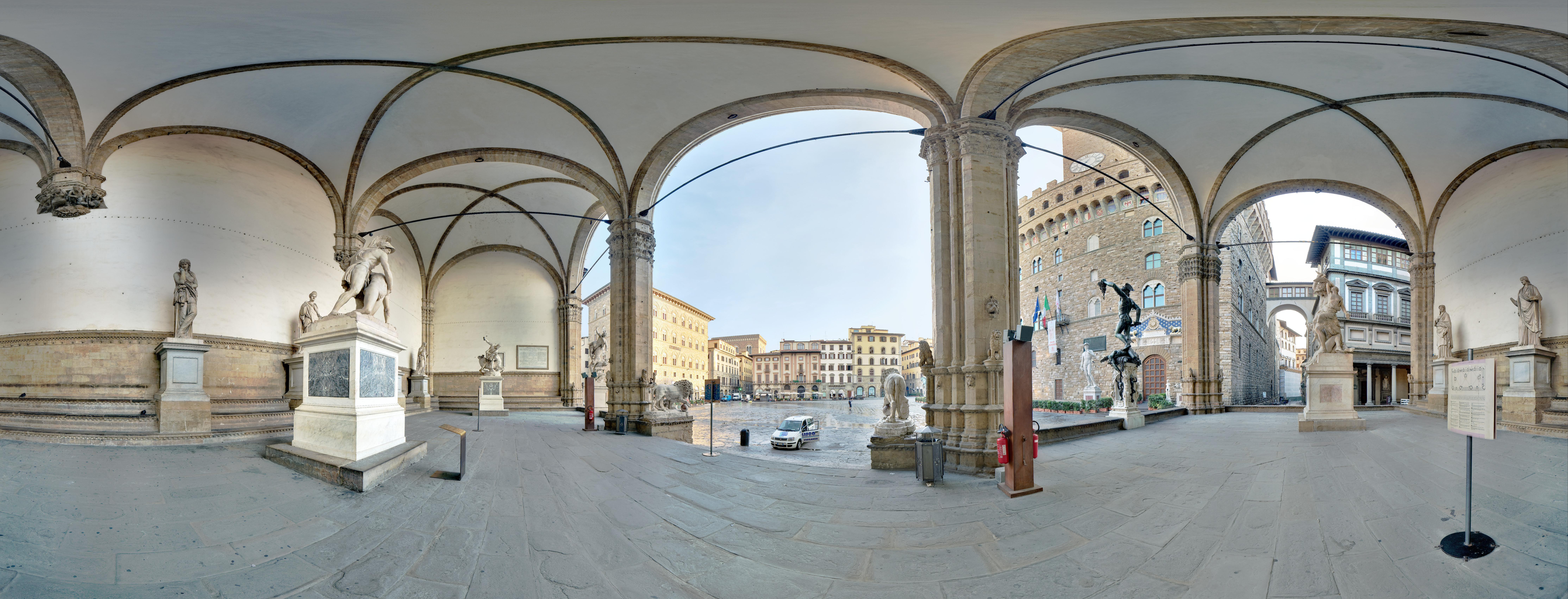 Loggia dei Lanzi